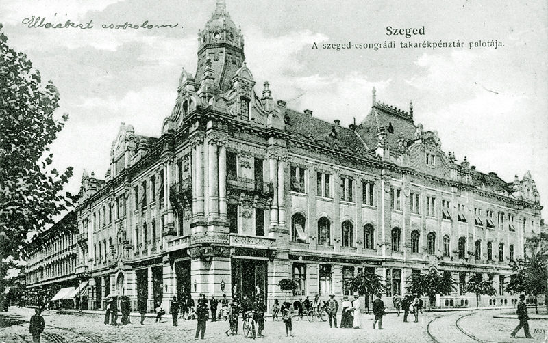 Szeged-Csongrádi Takarékénztár épületének korabeli fotója az 1910-es évekből. Tervezte: Baumhorn Lipót 1903-04